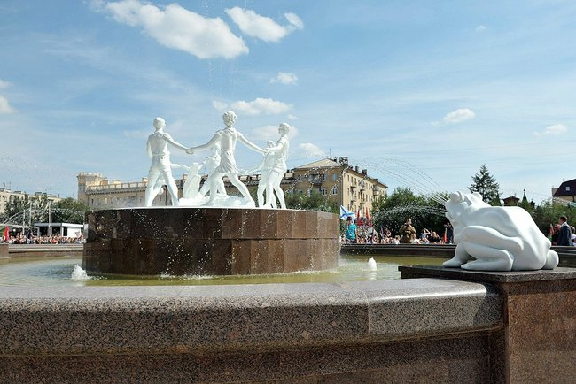 Открытие фонтана